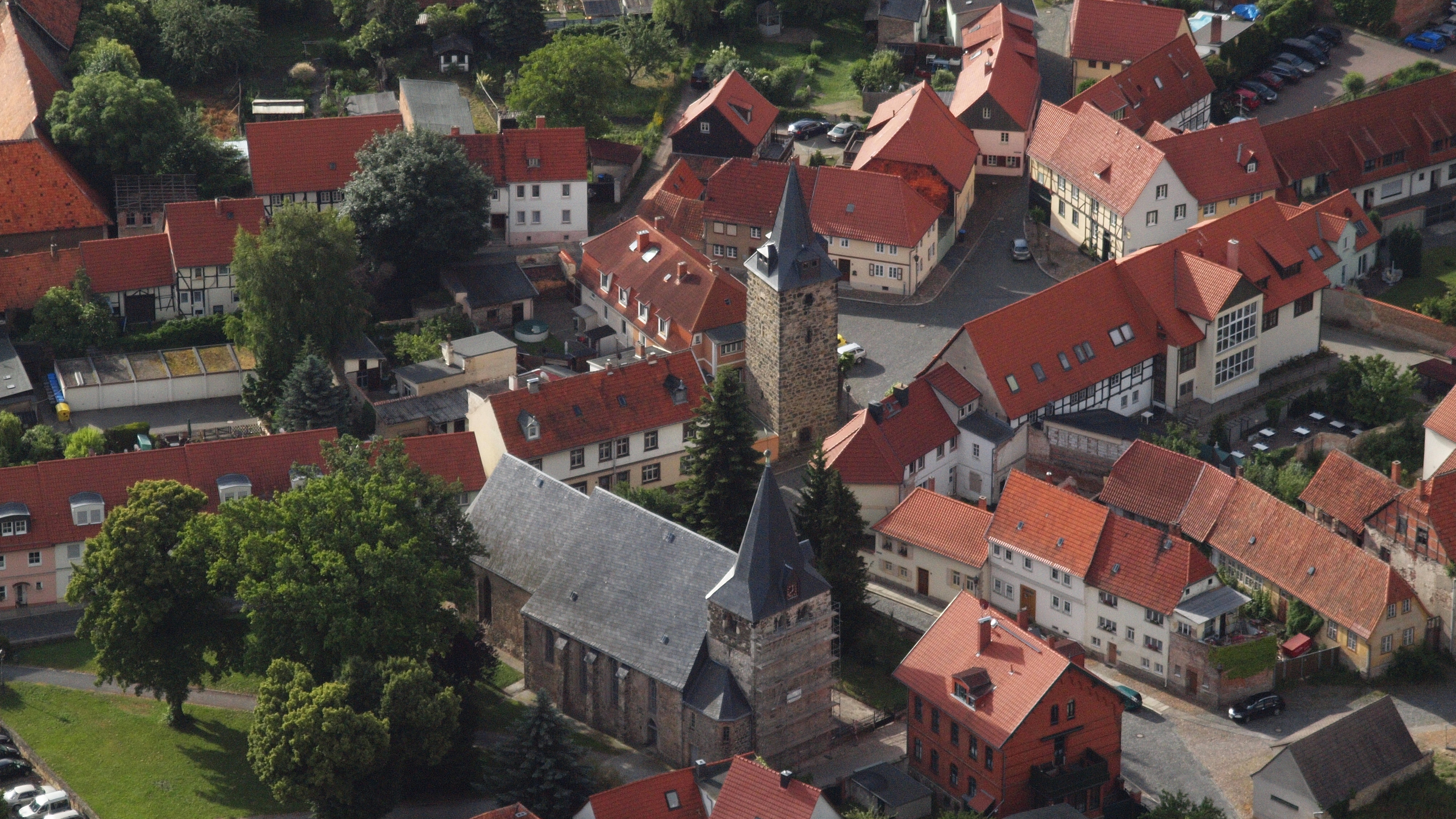 Ballenstedt: Luftaufnahme, Detailansicht im Bereich Badstuben – Kirchplatz